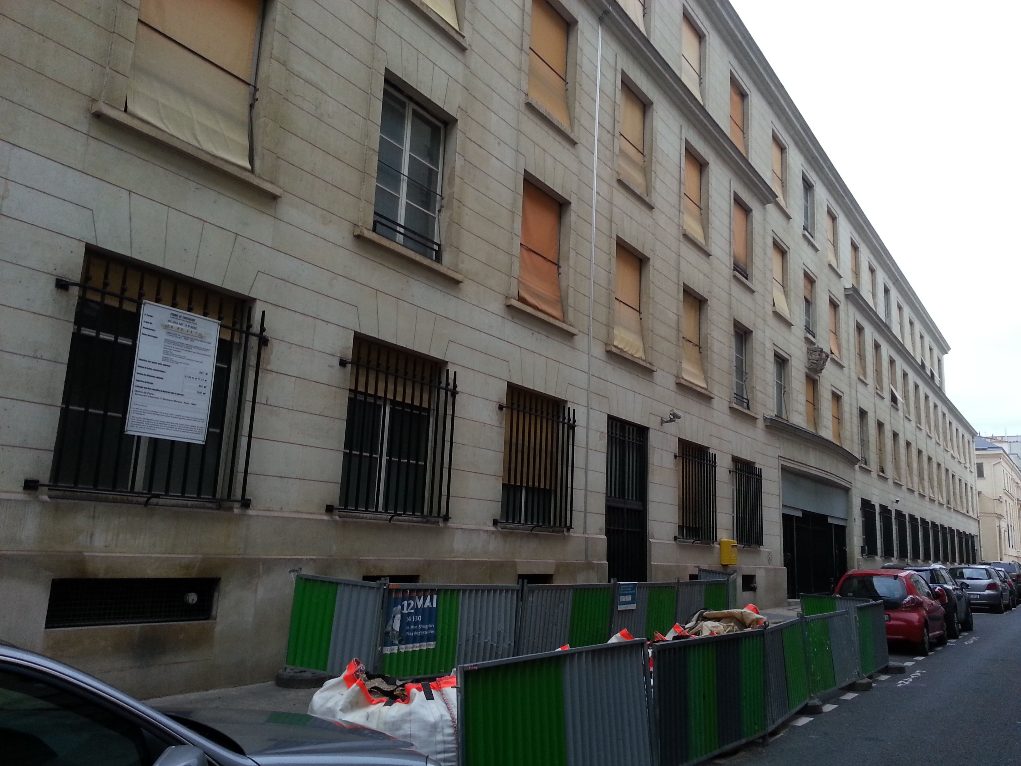 Hôtel Montesquiou-Fezensac(actuel ministère de la Coopération) .